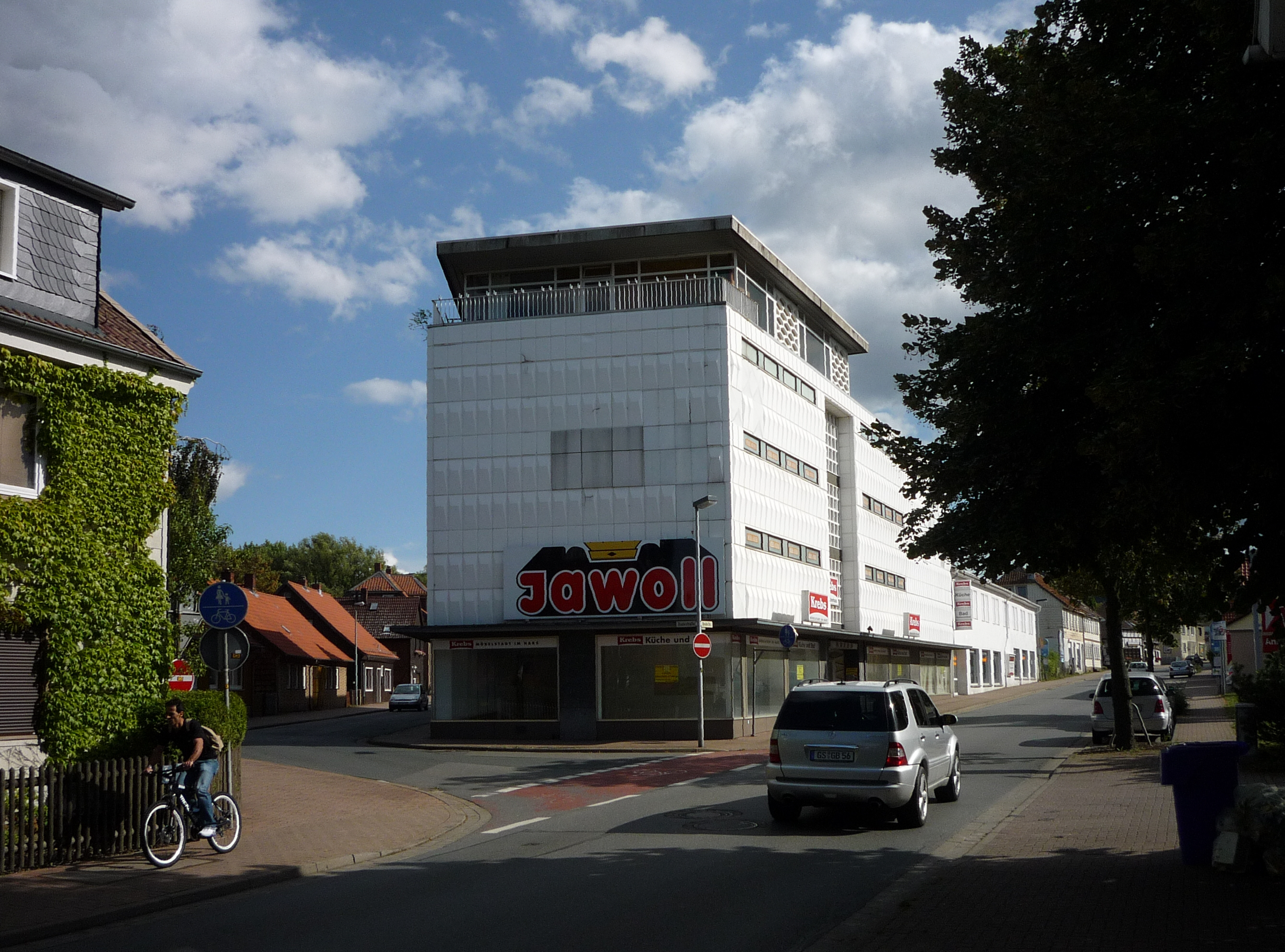 Ehemaliges Möbelhaus Krebs in Bündheim-Bad Harzburg. Geschäftsgebäude an der Straßengabelung Badestraße und Breite Straße (früher Dr.-Heinrich-Jasper-Straße). Aufnahmedatum 2009-09, zu diesem Zeitpunkt stand das Gebäude leer. NACHTRAG: Am 03.09.2015 ist das Gebäude des Möbelhauses Krebs durch einen Brand vollständig zerstört worden. Die Polizeiinspektion Goslar berichtete am 23.10.2015: "Seitens des Brandgutachters und der ermittelnden Polizeibeamten konnte bereits gesichert festgestellt werden, dass Brandstiftung vorliegt."